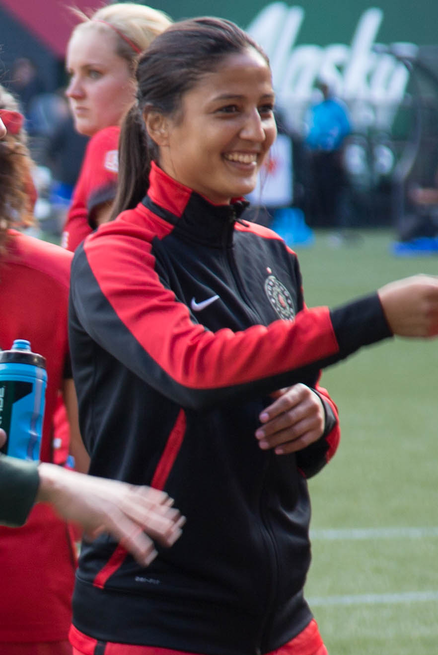 N42A3248.jpg